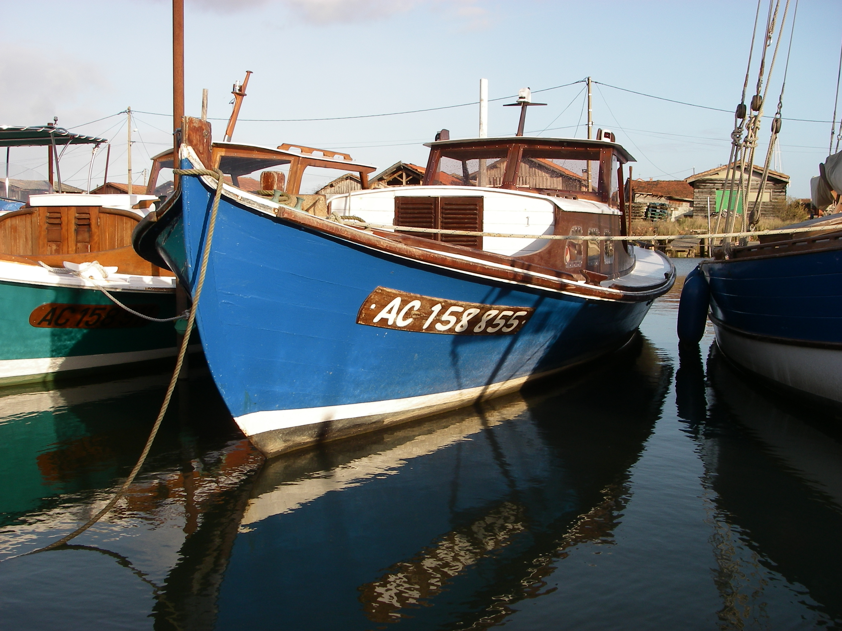 Pinasse sur le port de la Teste de Buch (Gironde, Aquitaine, France)